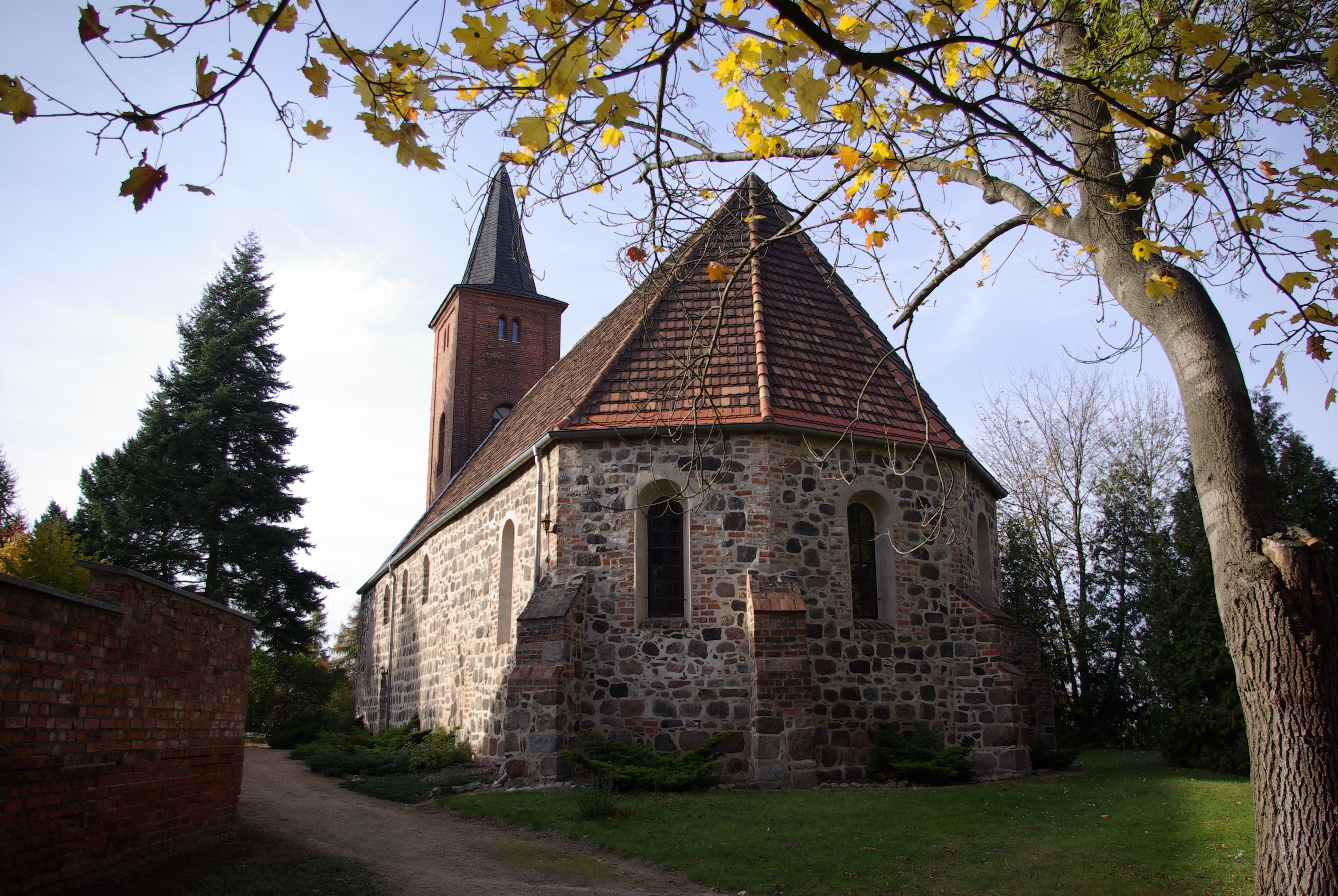 Nidergörsdorf in Brandenburg. Die Kirche stammt im Ursprung aus dem 12. Jahrhundert und steht unter Denkmalschutz.